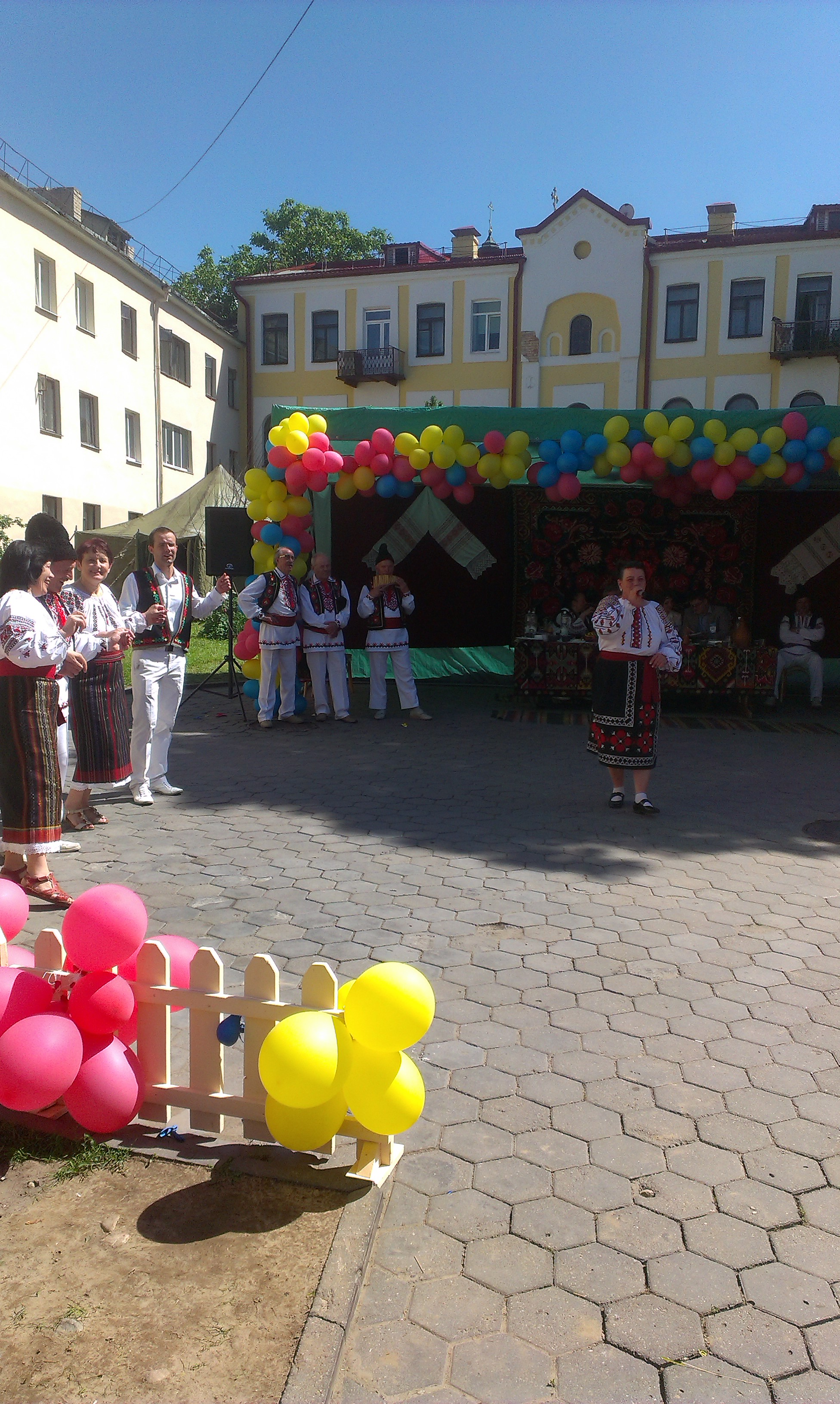 Малдоўскі падворак на X Рэспубліканскім фестывале нацыянальных культур